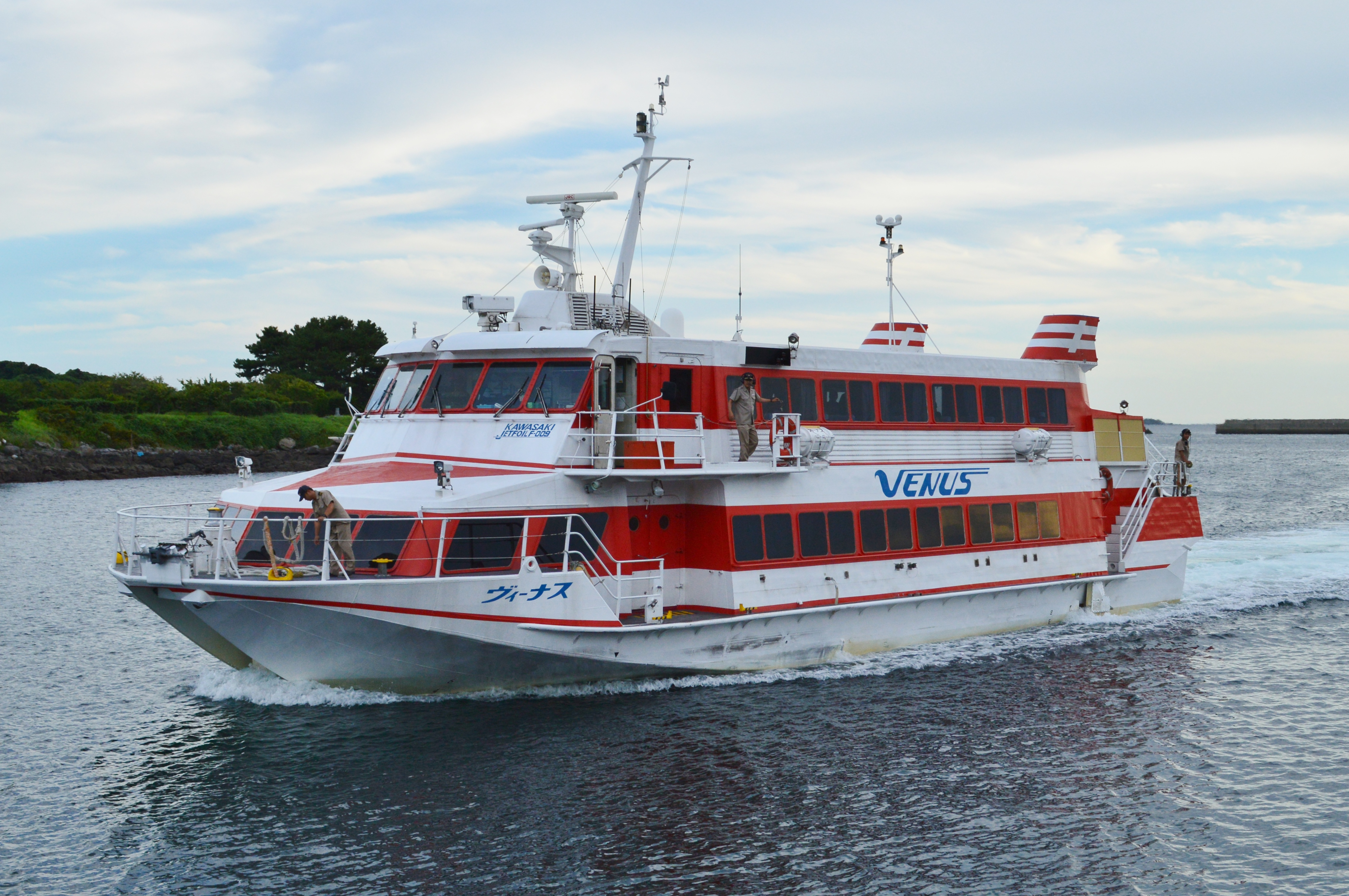 フェリーヴィーナス (郷ノ浦港にて)